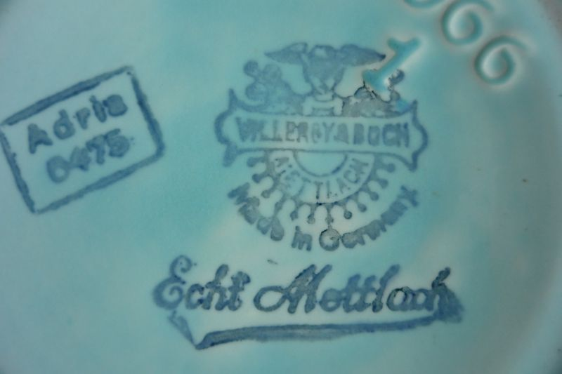 Firmenstempel von "Villeroy & Boch" auf einer Vase, ca. 1934